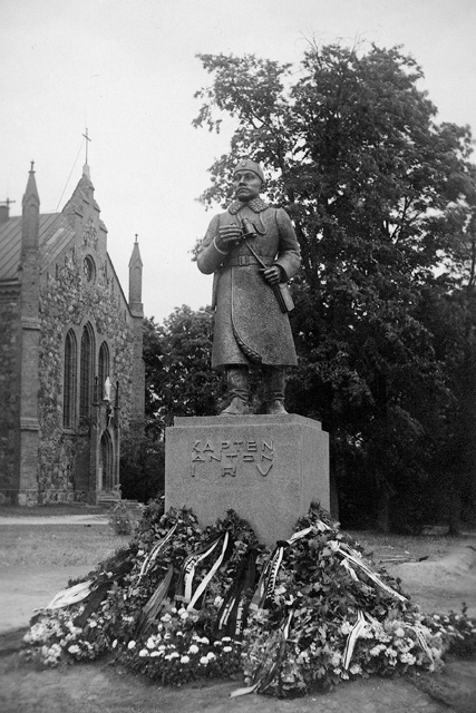 1933. aastal avatud monument kapten Anton Irvele Viljandis. Monument hävitati 1940. aastal.